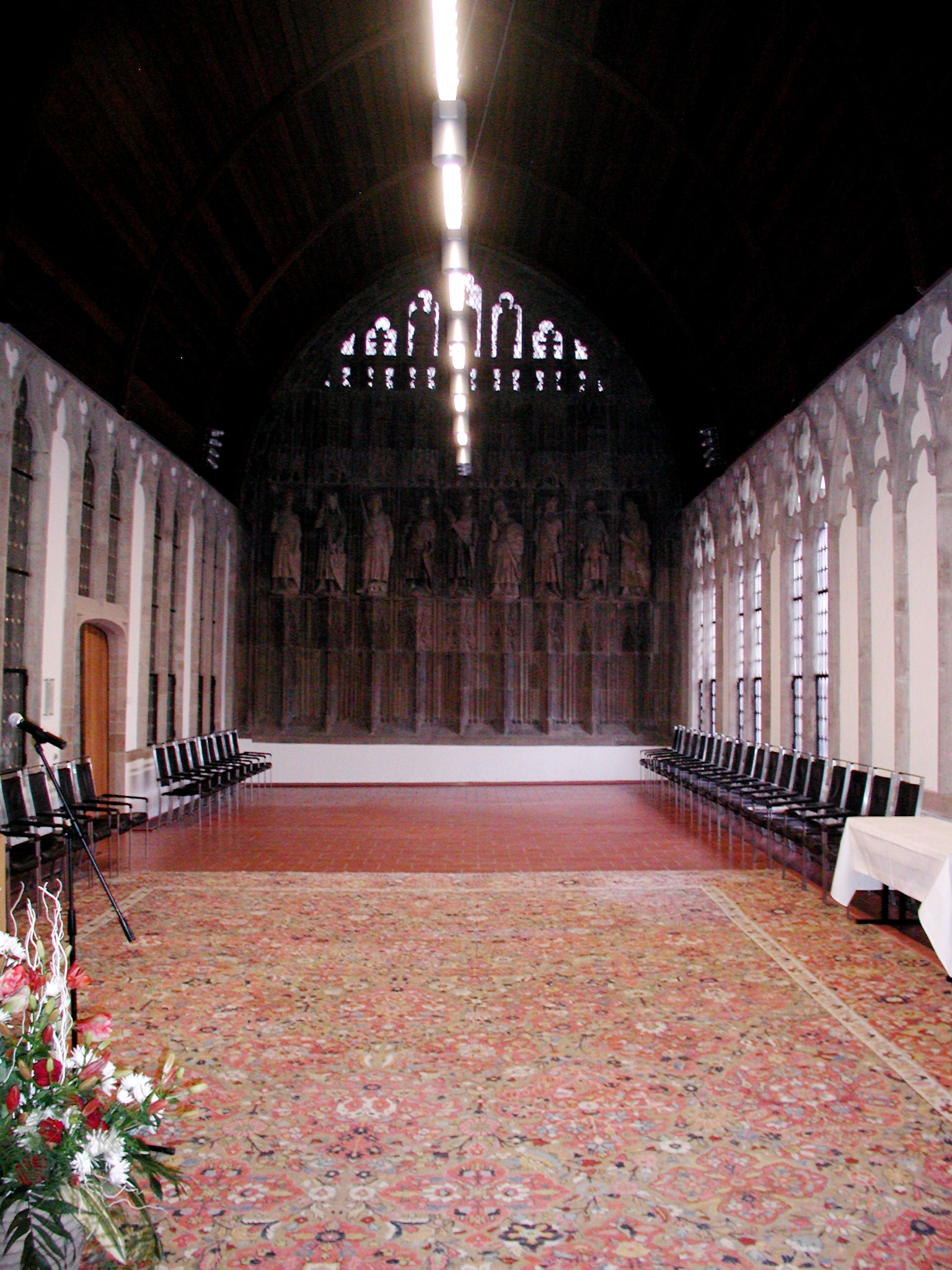 Köln-Rathaus, "Hansasaal" von 1330